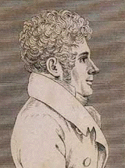 Stik af skuespilleren og oversætteren Peter Thun Foersom, der levede 1777-1817